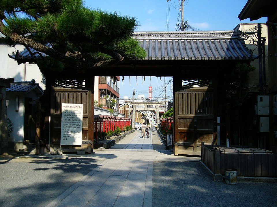 茨木神社東門 茨木城搦手門を移築したもの